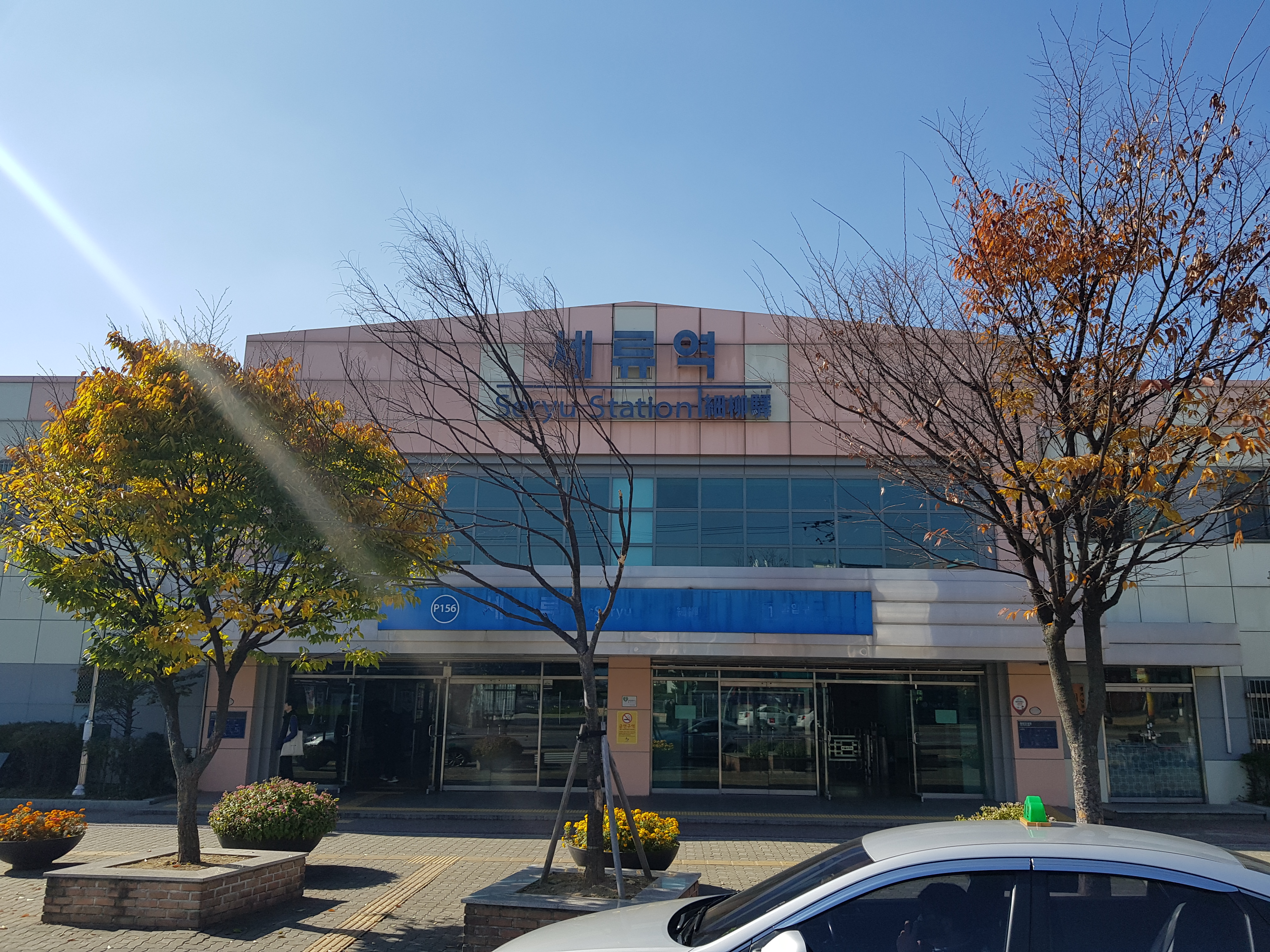 2018년 11월 4일에 촬영된 세류역의 모습